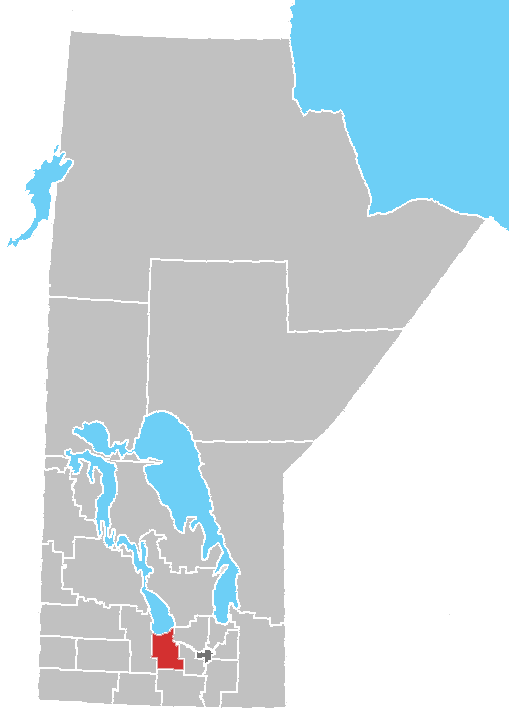 Manitoba census area No. 9